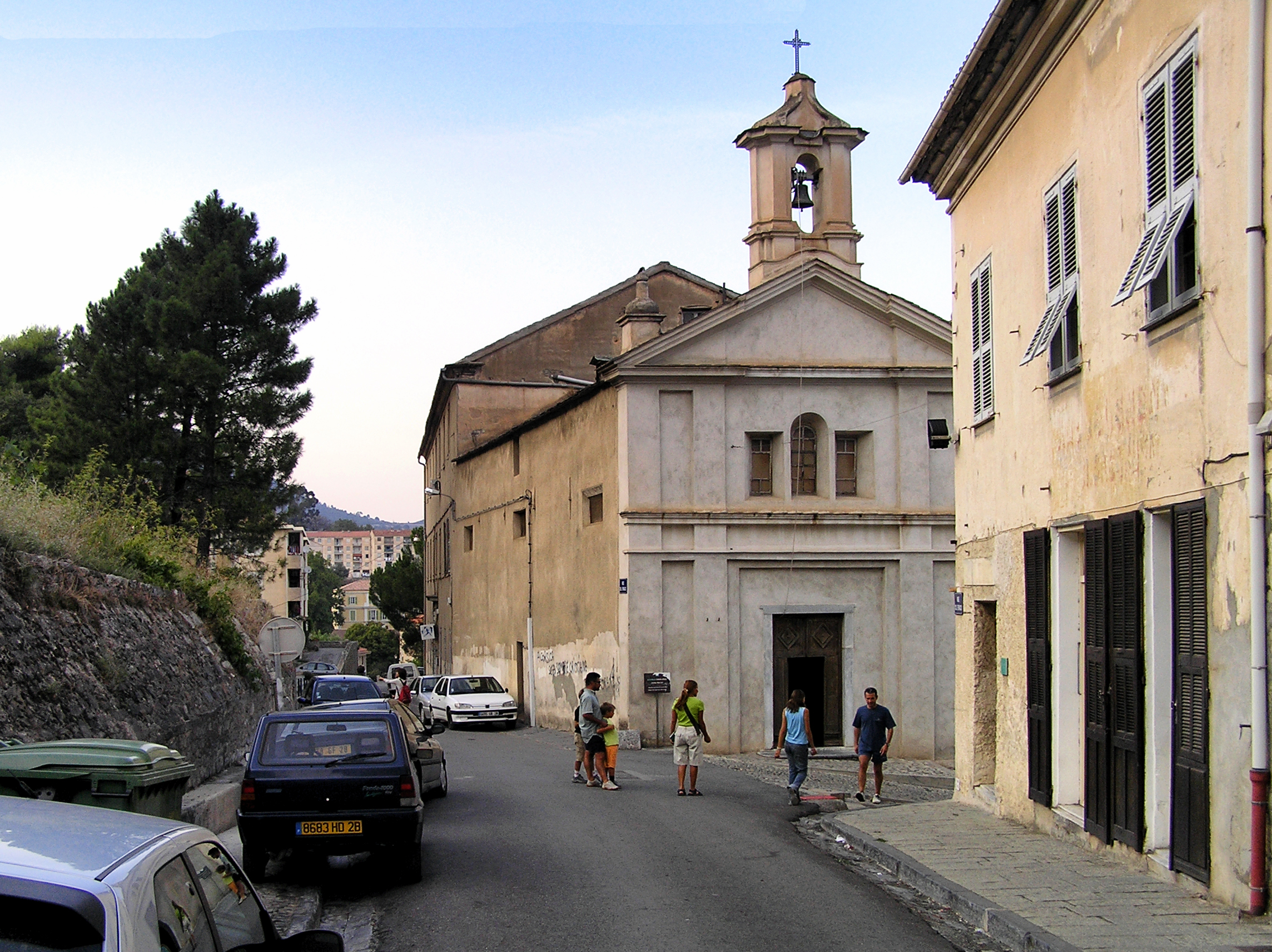 Corte, Centre Corse - Chapelle Sainte-Croix, en haut de la rampe du même nom